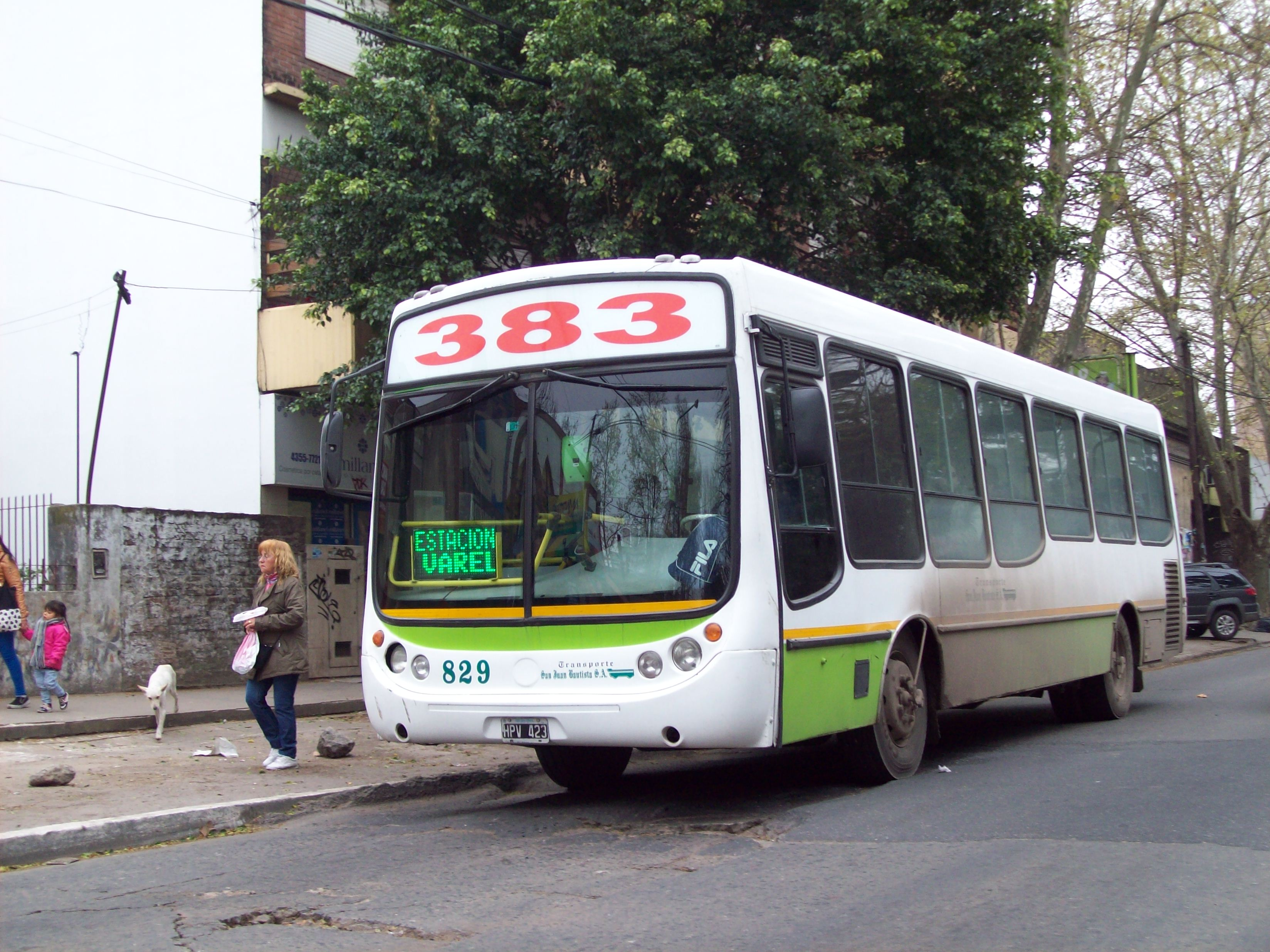 Colectivo línea 383 por Avenida San Martín, Florencio Varela.